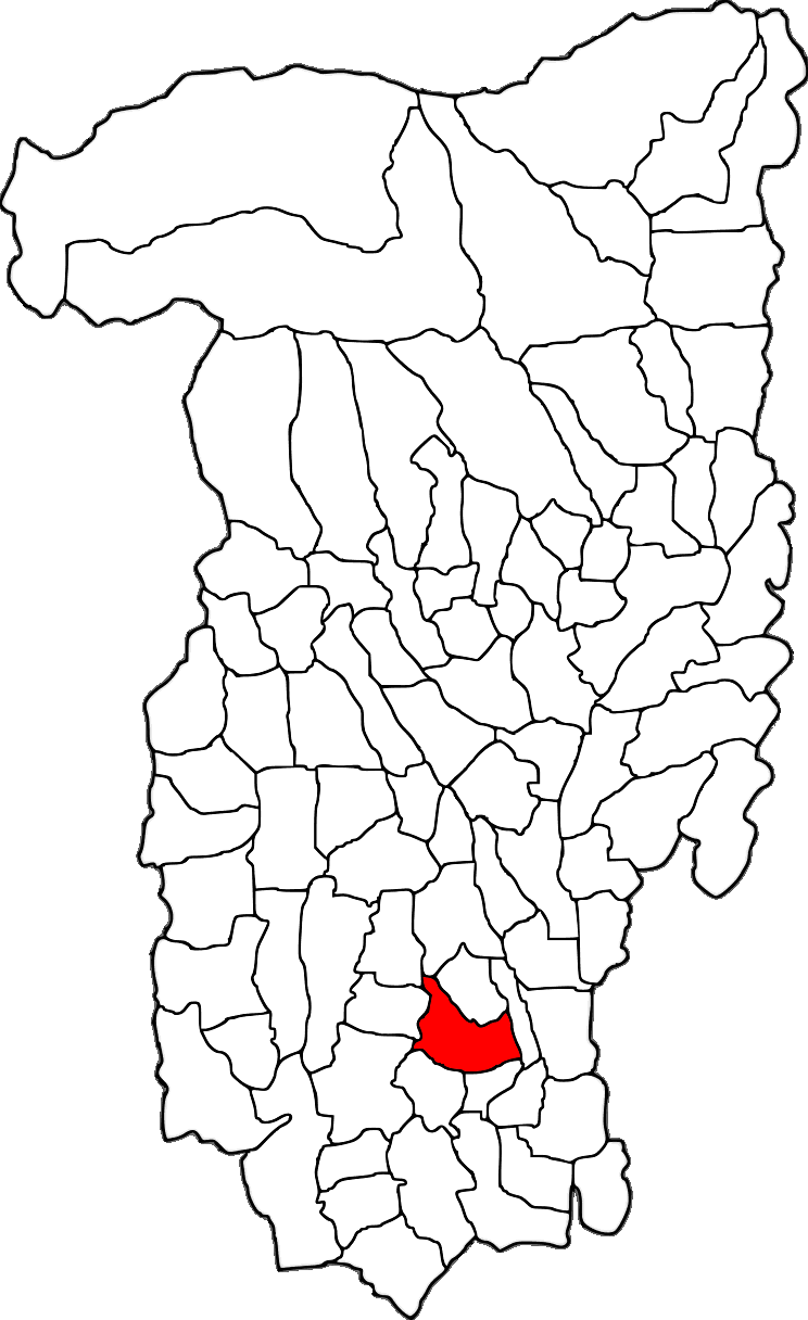 Lage der Gemeinde Gușoeni im Kreis Vâlcea (RO).